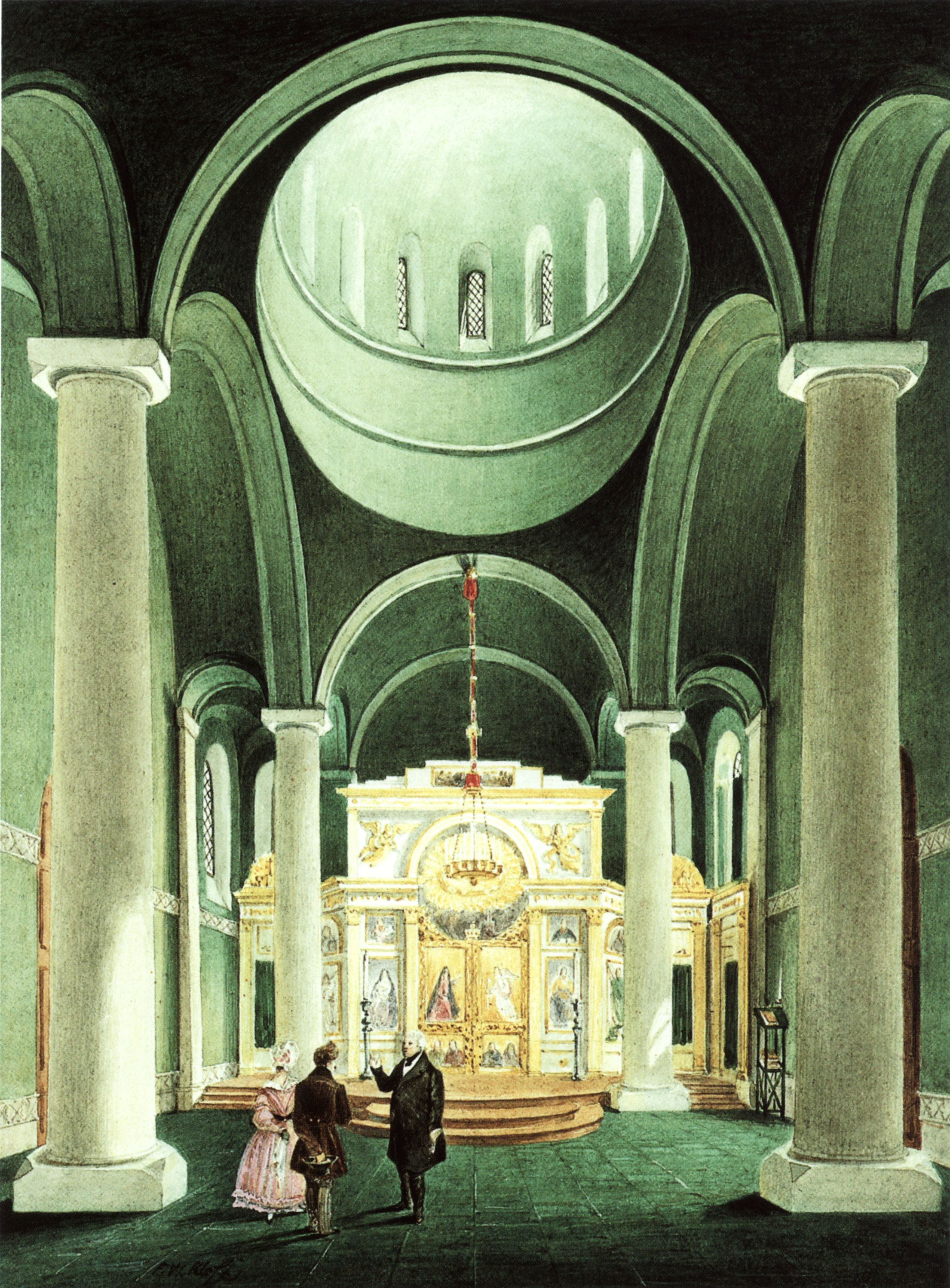 Potsdam - das Innere der Alexander-Newski- Gedächtniskirche.